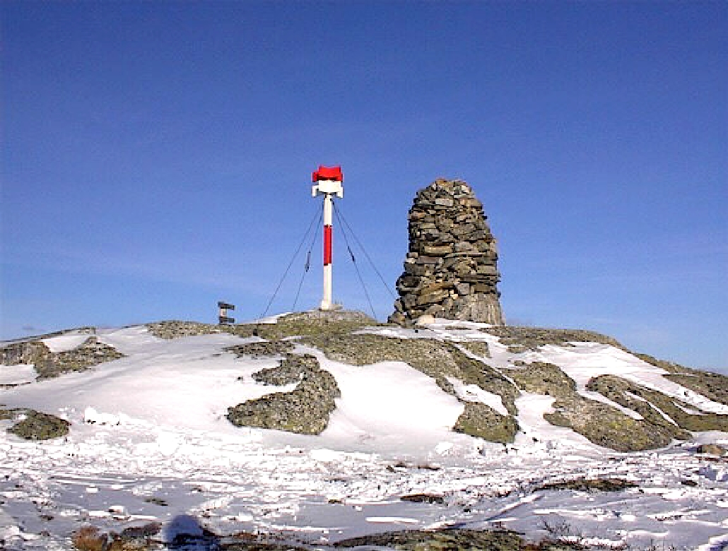 Blåfjell, 1154 m.o.h.